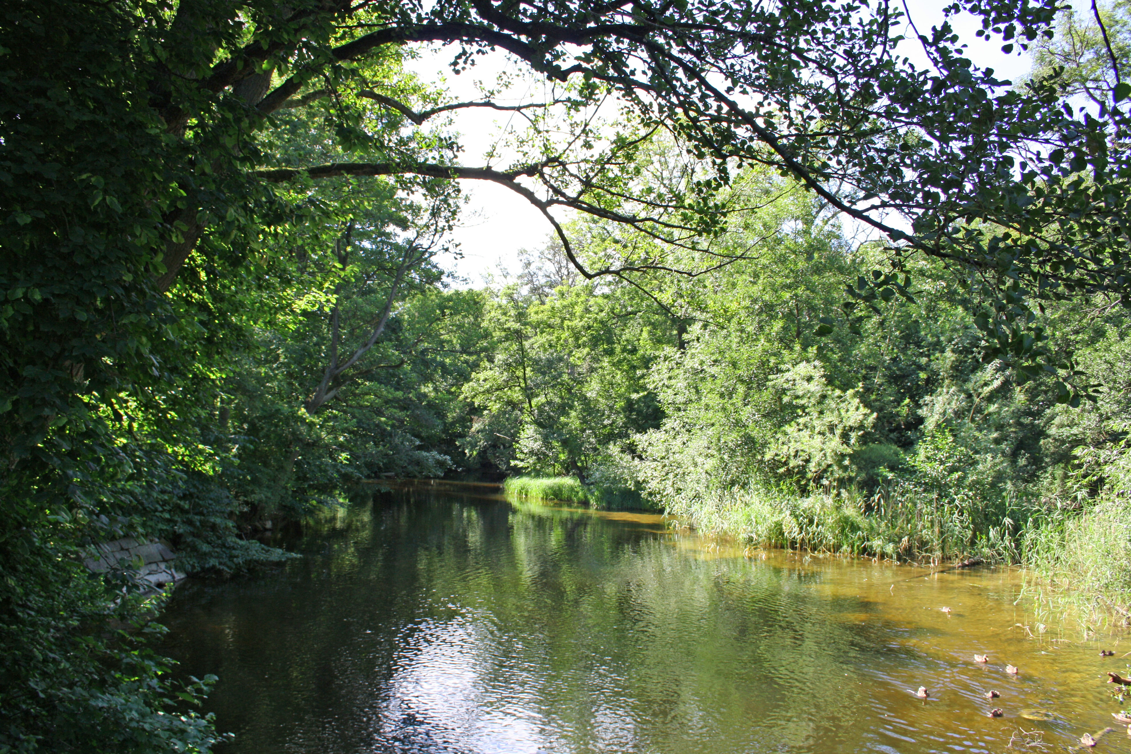 Skräbeån, vid Bromölla.